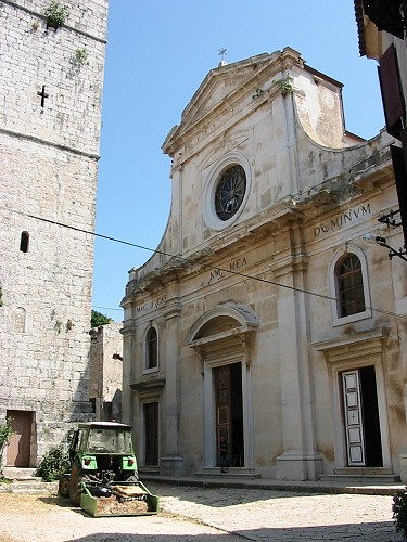 Foto personale.